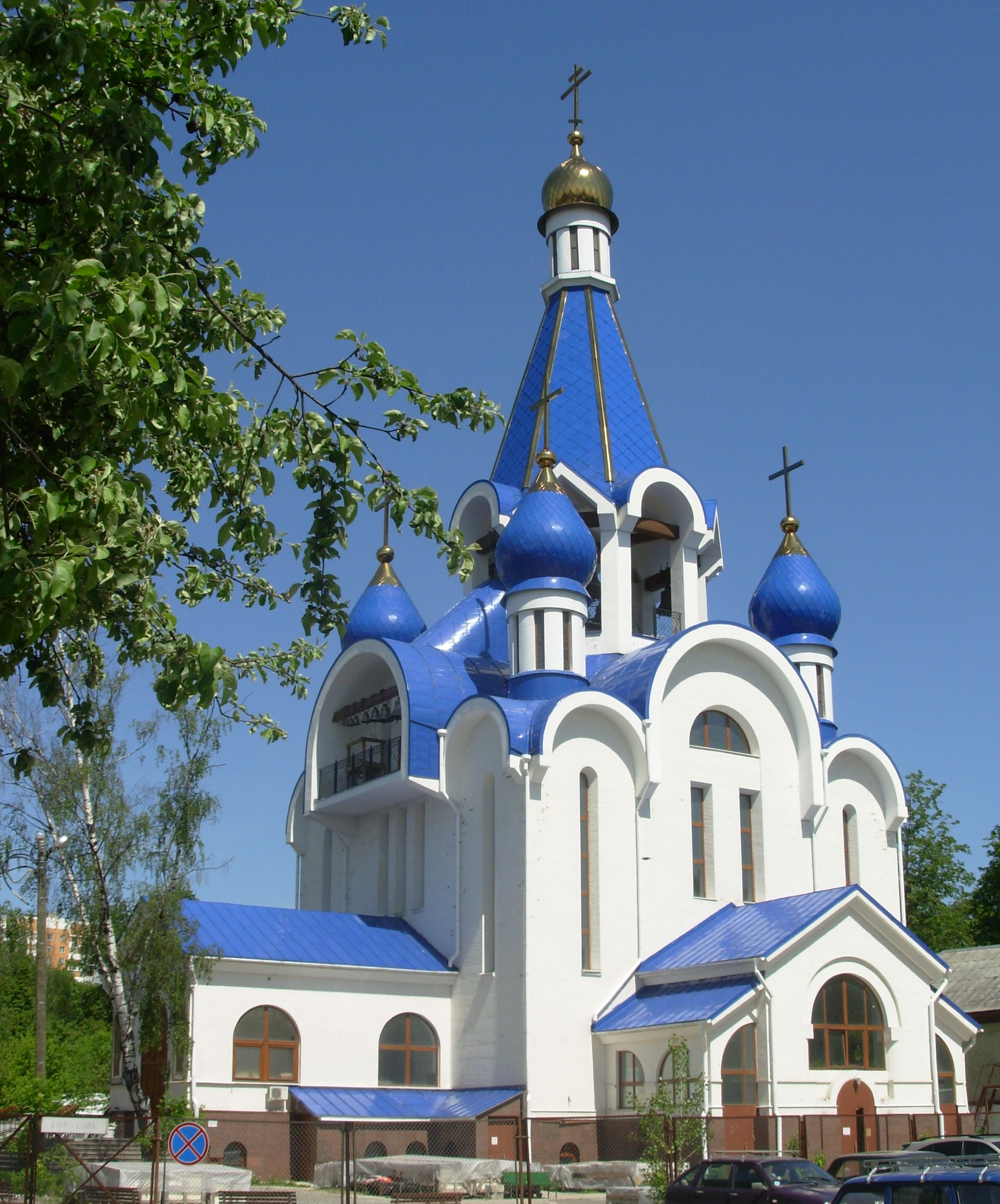 храм